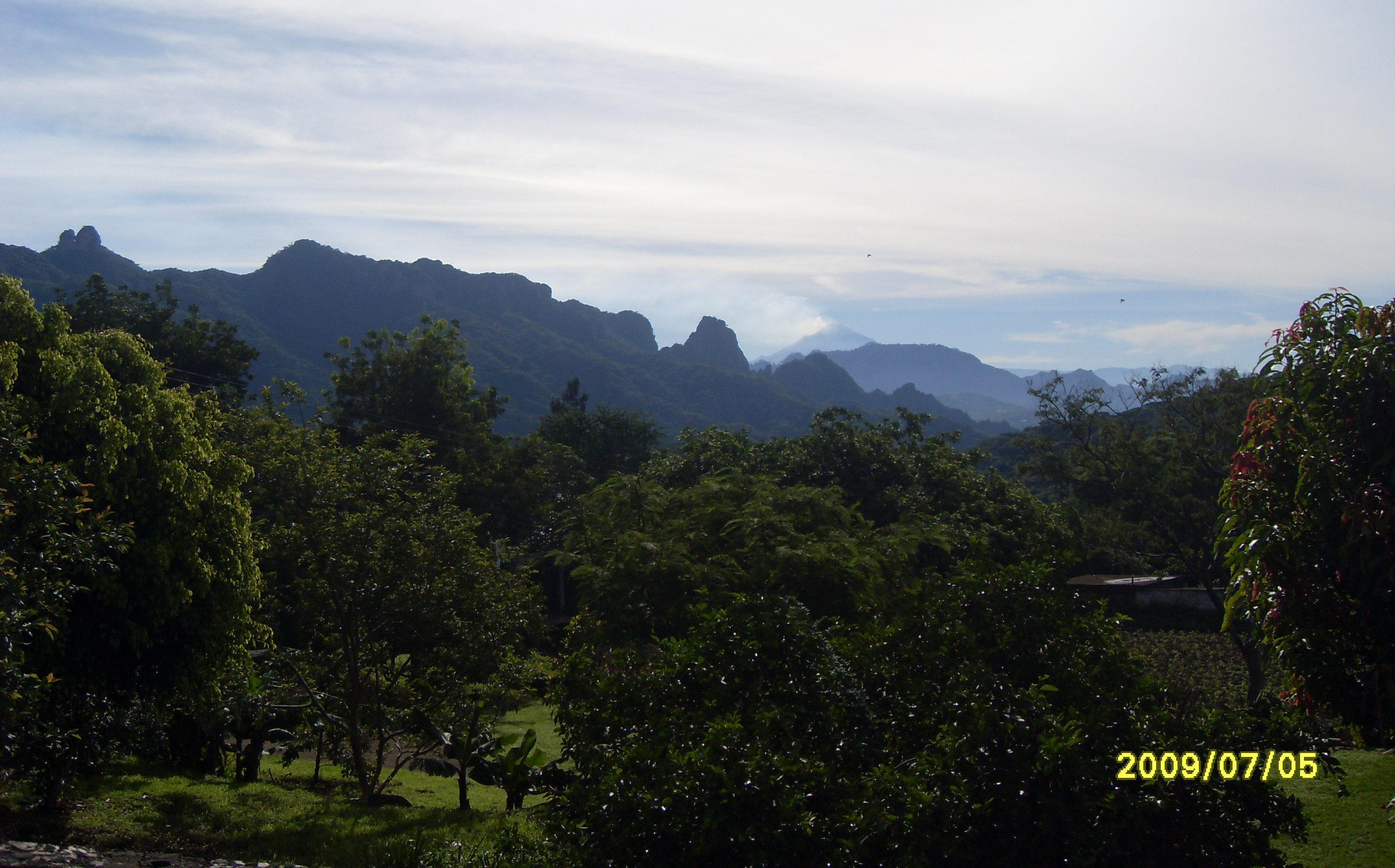 Por encontrarse en un clima de selva baja caducifolia, este poblado tiene diversos paisajes al año